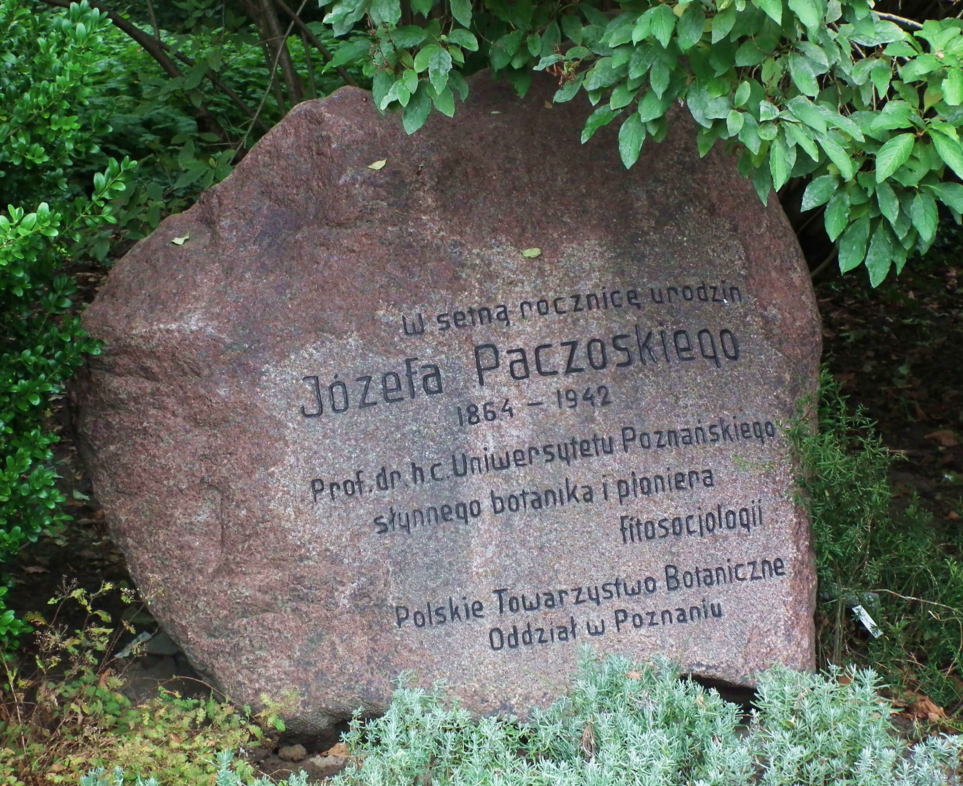 Kamień Józefa Paczoskiego - Poznań, Ogród Botaniczny.